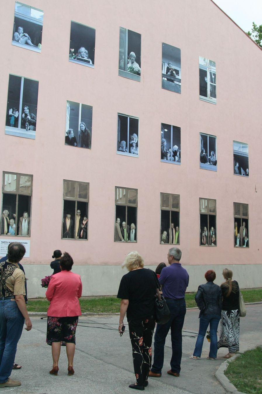 Tartu linna päev 2013.